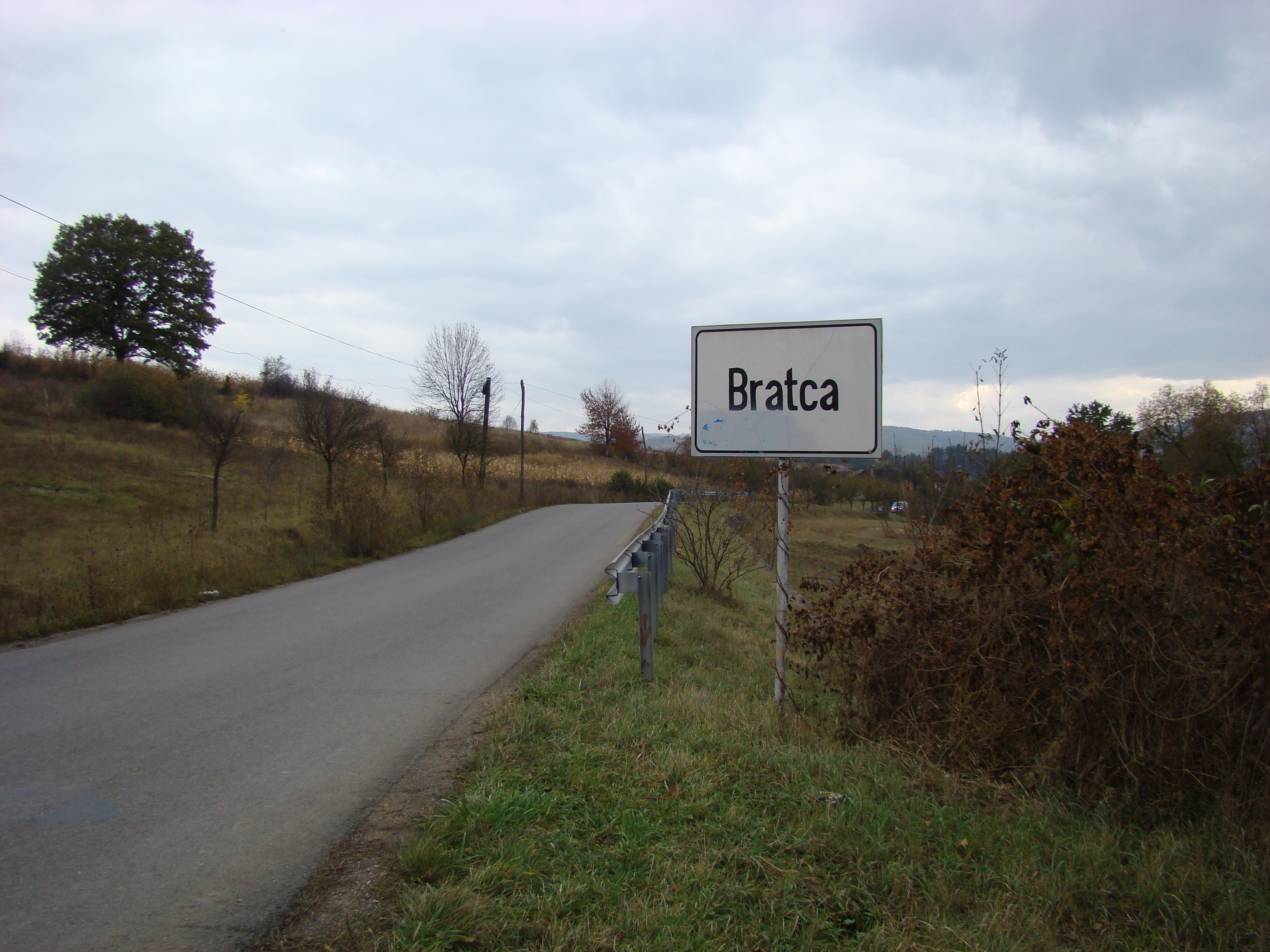 Bratca, județul Bihor